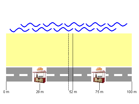 Iceseller problem 2